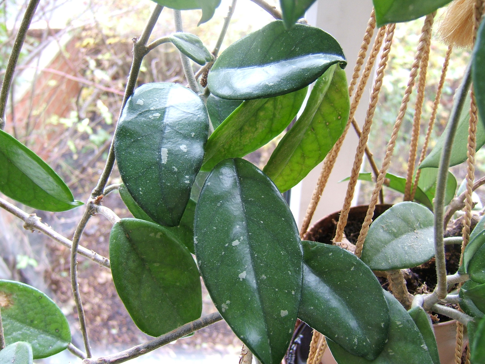 Hoya carnosa cultivated plant. Leaves.